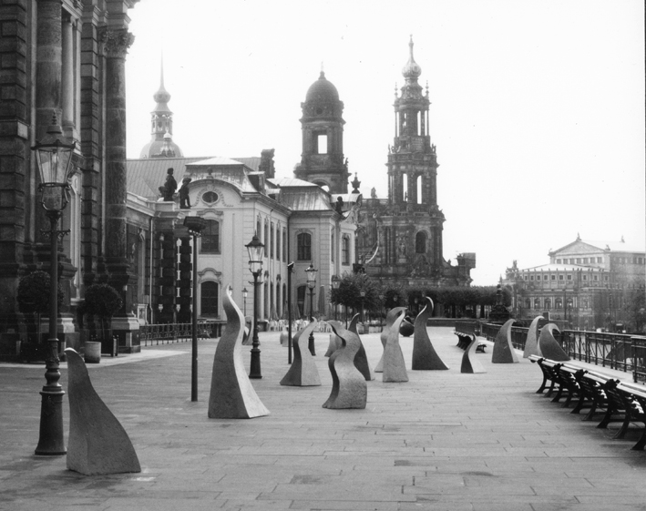 Bewegung Nurr, 17 Fremde, Skulpturengruppe aus Sandstein, Brühlsche Terrasse, Dresden, 1995